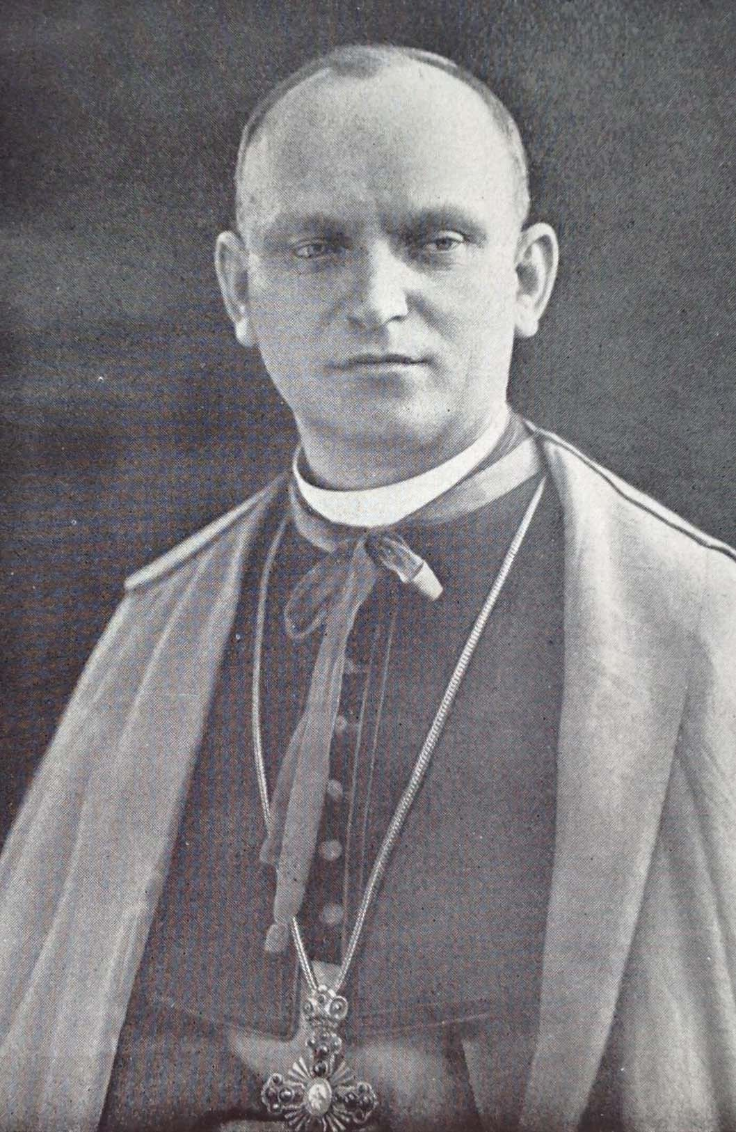 PhDr. ThDr. Josef Čihák (1880-1960), český římskokatolický kněz, kanovník Metropolitní kapituly u sv. Víta v Praze